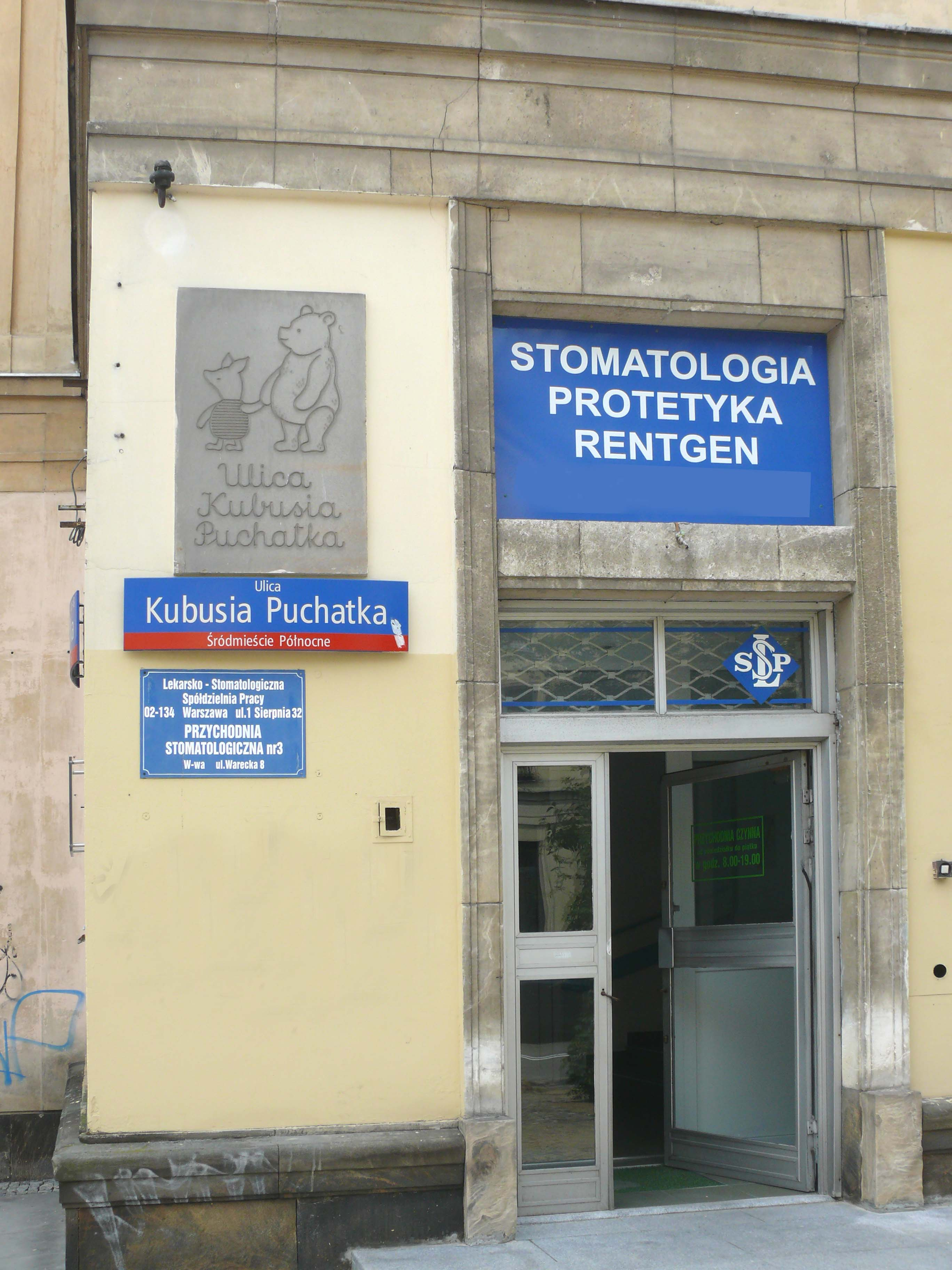 Улица Винни-Пуха в Варшаве, Польша